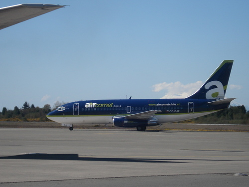 Foto Tomada en el aeropuerto internacional "El Tepual" Puerto Montt, Chile en la foto se aprecia un Boeing 737-200 Advance, de la aerolinea Air Comet Chile